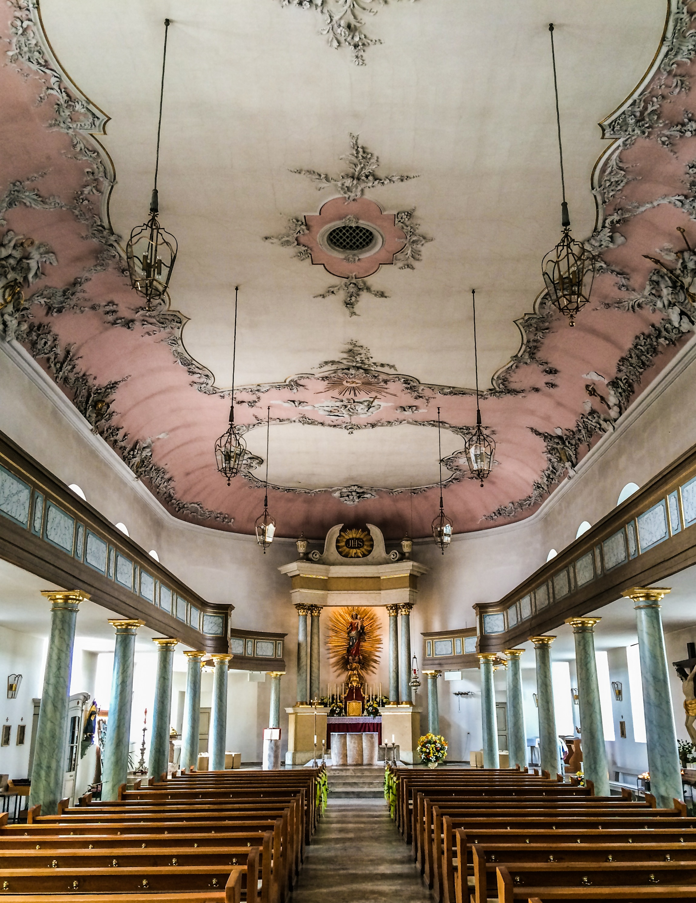 Innenansicht der Schlosskirche in Bayreuth (Juni 2014)